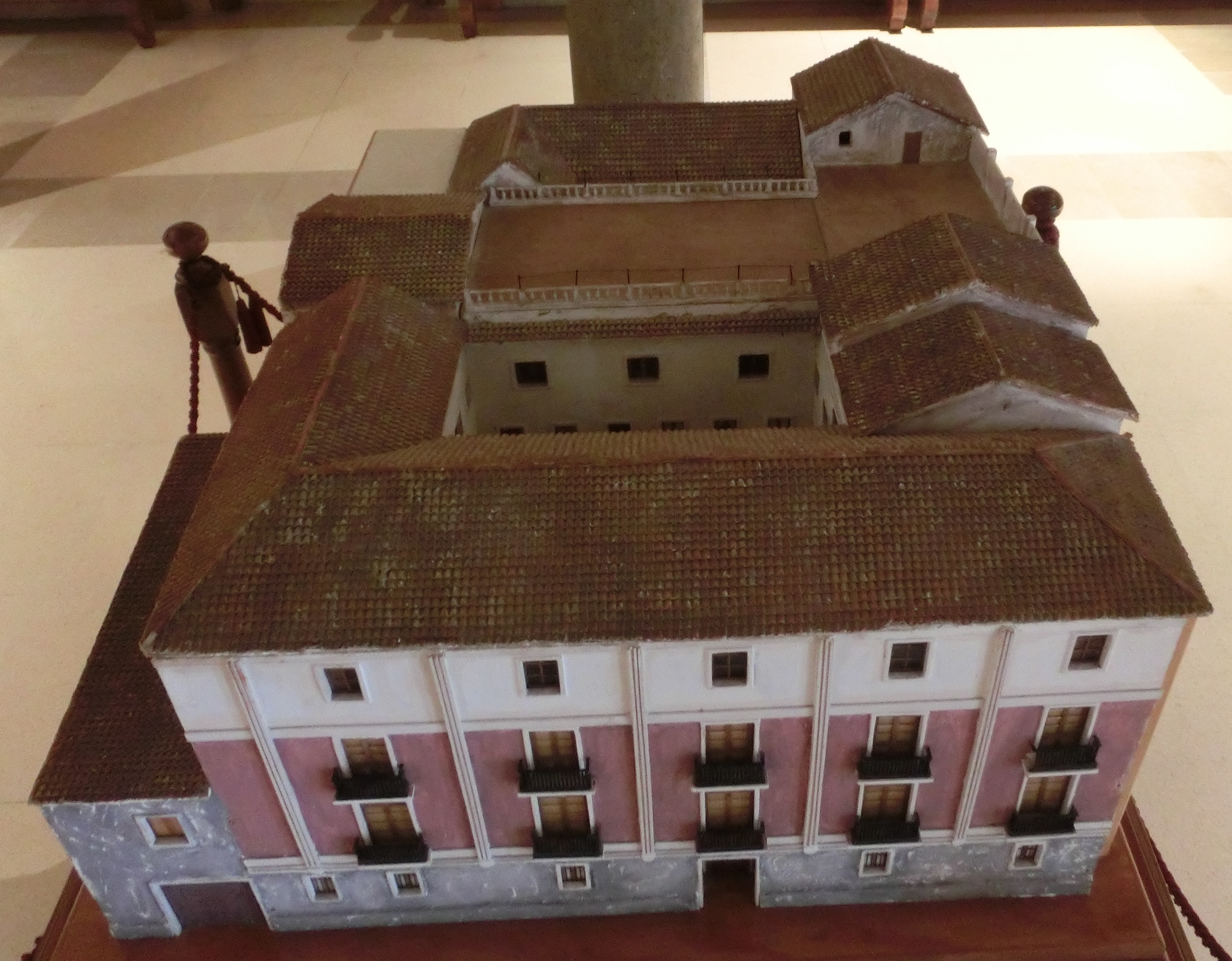 Plastico dell'edificio seminario clarettiano di Barbastro, (Huesca) in Spagna com'era nel 1936, all'epoca del martirio dei seminaristi. La riproduzione è visibile nel museo dei martiri clarettiani a Barbastro.